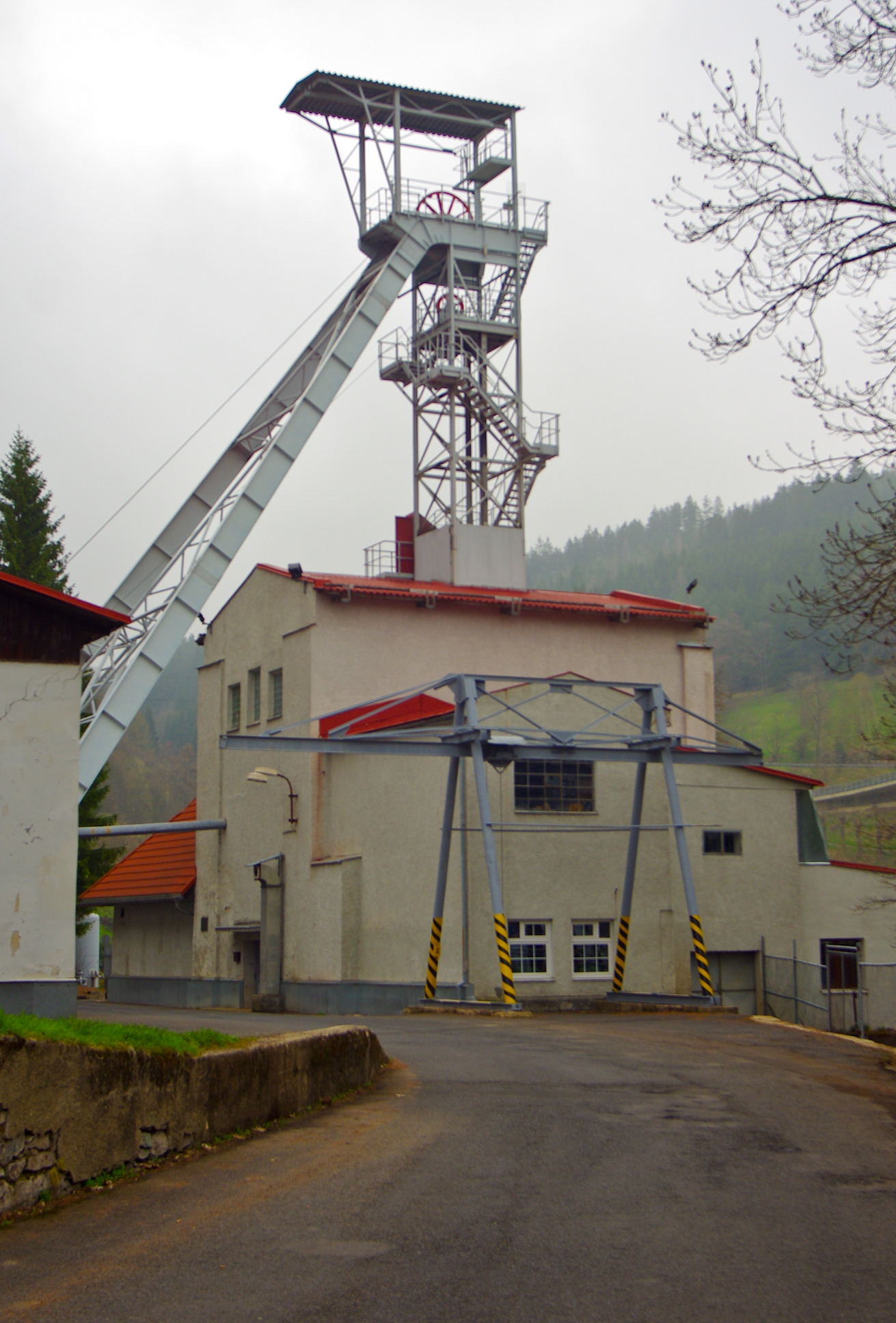 Jáchymov těžní věž šachty Svornost